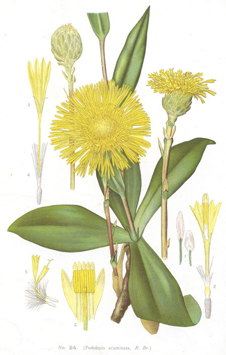 Podolepis jaceoides (published as Podolepis acuminata)